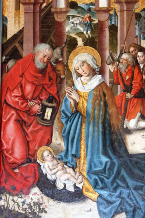 Weihnachtsdarstellung vom Boßweiler Altar in Speyer